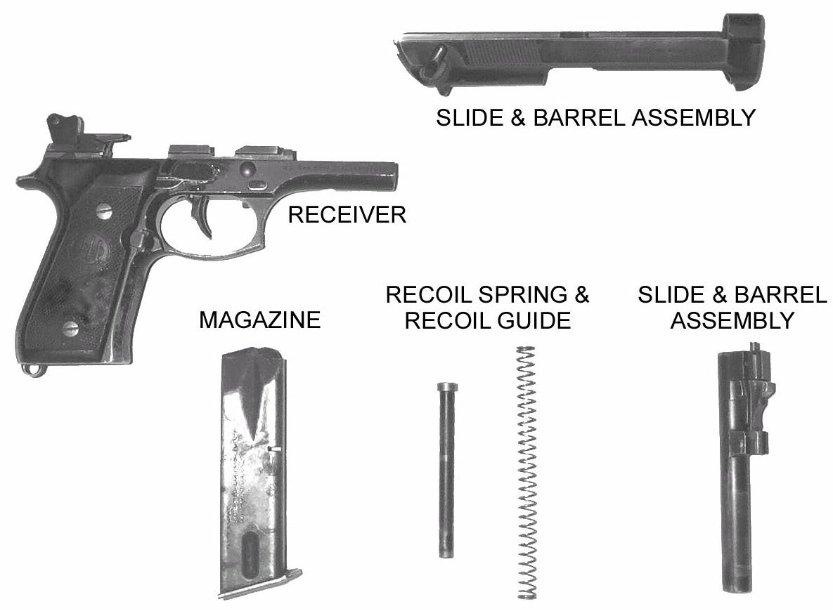 Pistol M9 (Beretta 92F) main parts